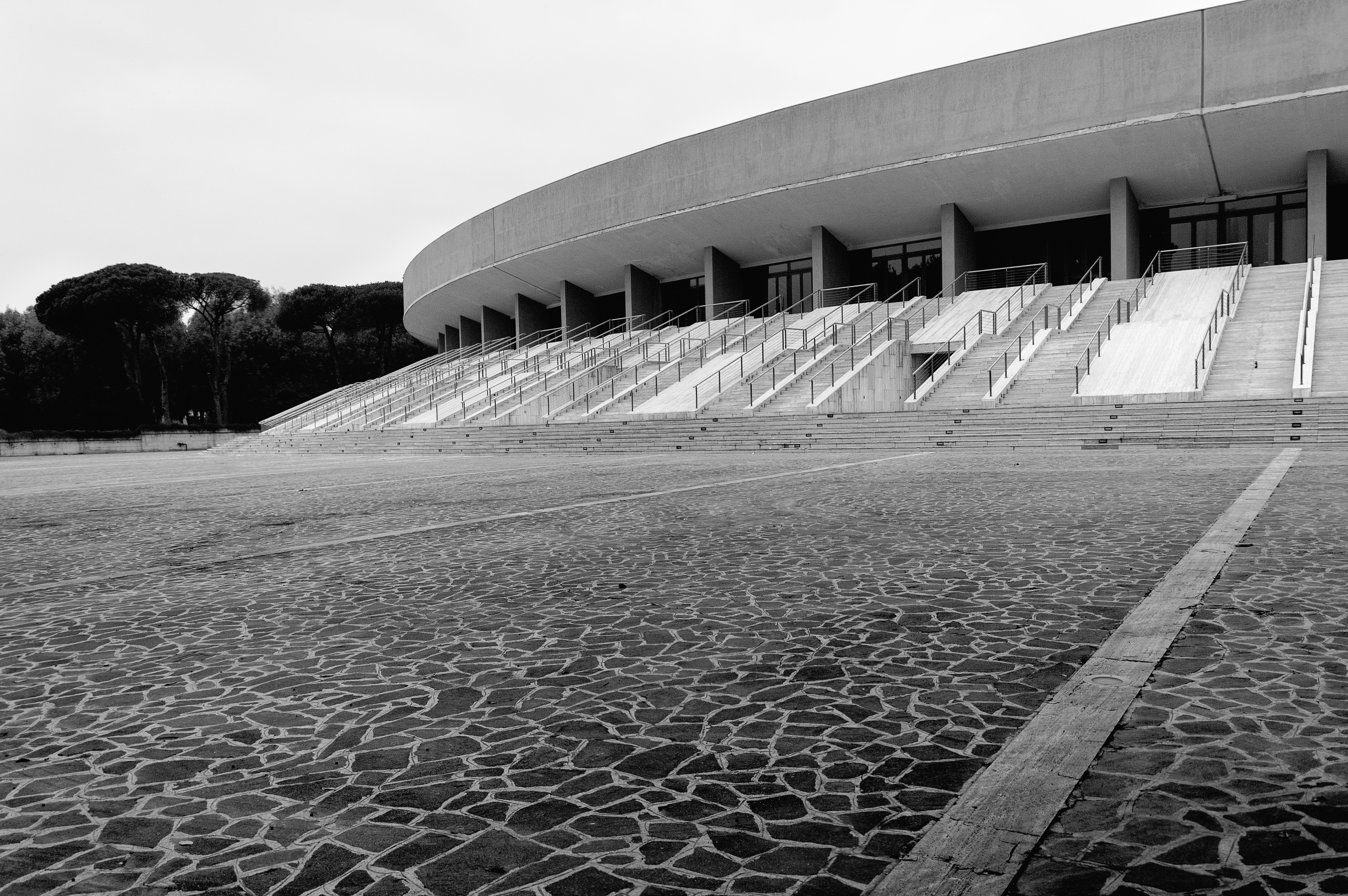 Esterno della nuova arena, riprogettata nel 1990 a seguito dei danni degli sfollati del terremoto del 1980.